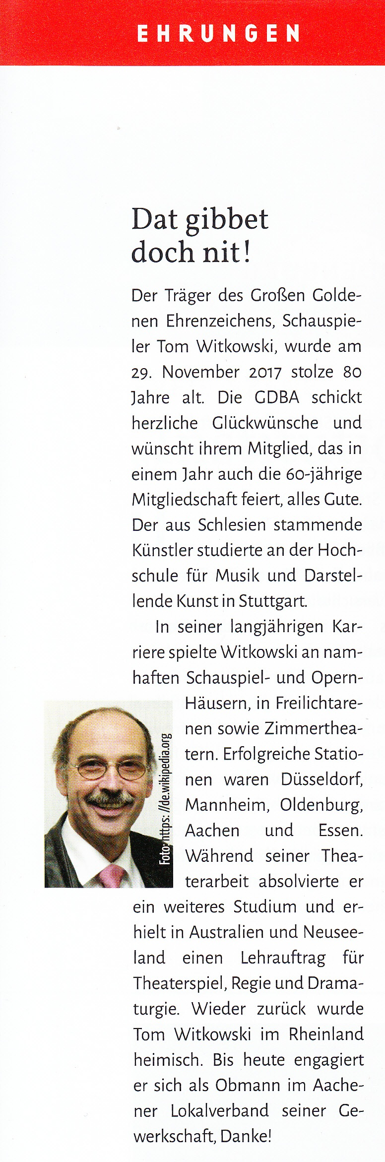 Eine Ehrung zum 80igsten Geburtstag im Fachblatt der GDBA Genossenschaft Deutscher Bühnen-Angehöriger Jg. 69, 12/17 Seite 28